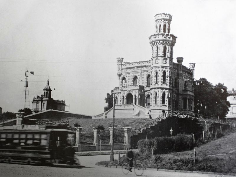 Vista de la residencia propiedad de Teófilo Lacroze en Avenida Luis María Campos esquina José Hernández, en el barrio Belgrano de Buenos Aires, a principios del siglo XX. El llamado "castillo de los leones" sería demolido en la década de 1940.